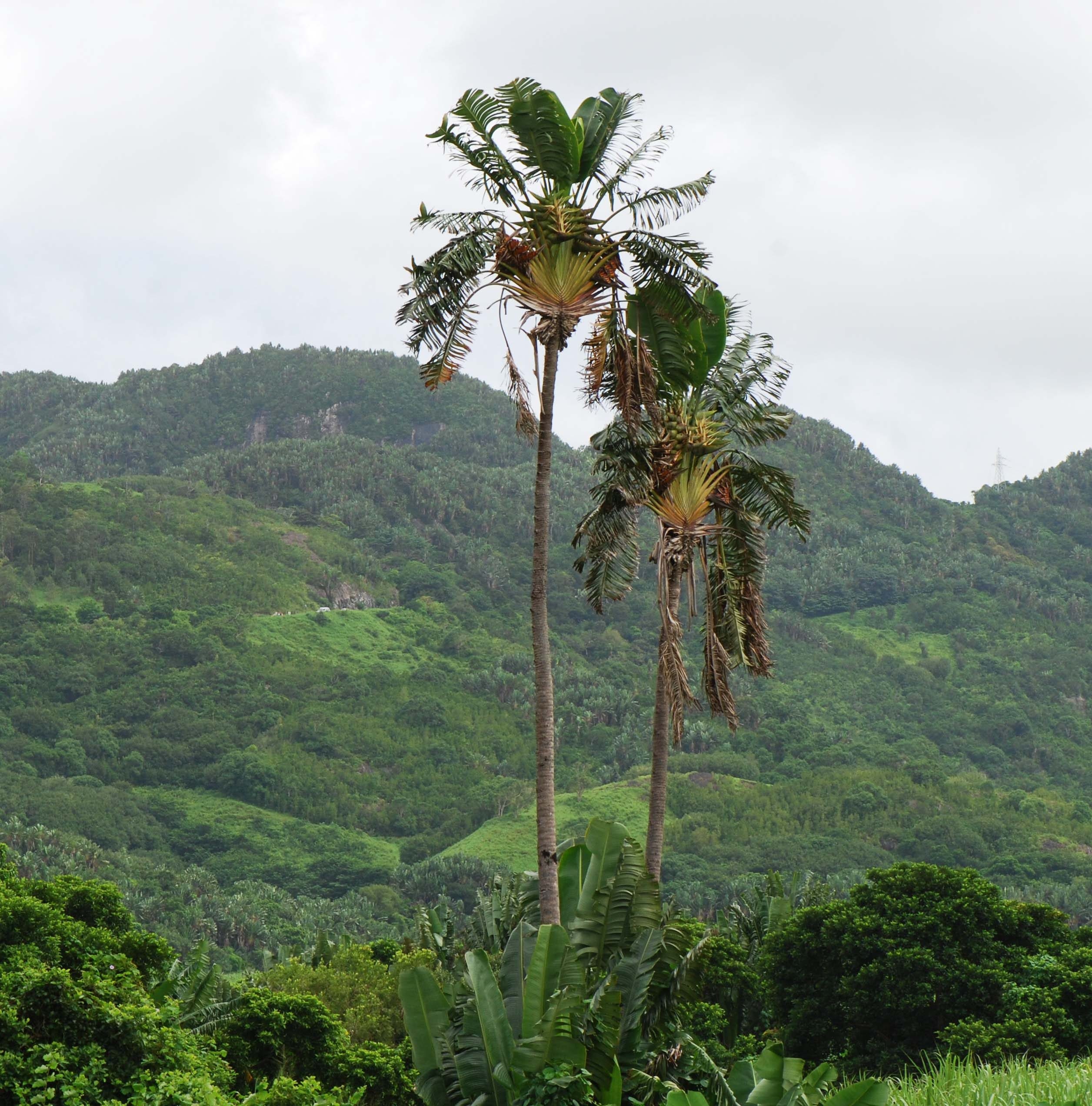 Ravenala madagascariensis, arbre du voyageur, Saint Hubert, Ile Maurice